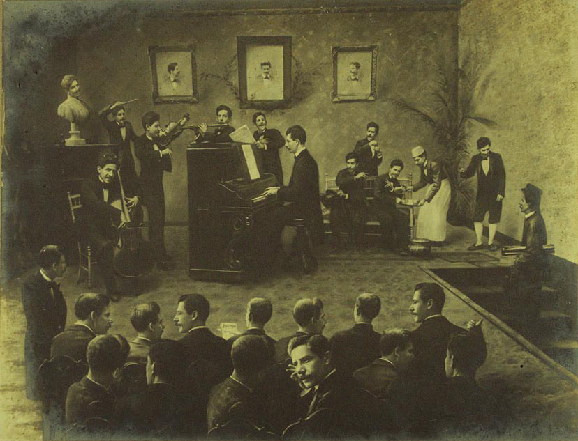 Fotomontagem de Valério Vieira intitulada "Os trinta valérios", produzida em 1901, retrata um ambiente festivo em que acontece um sarau, assistido por uma pequena platéia. Trata-se de uma fotomontagem produzida em papel de gelatina e prata (p&b, 22 x 29 cm). Valério Vieira se repete em todos os membros da audiência, músicos, maître, garçom, nos retratos pendurados na parede e no busto sobre um móvel, perfazendo o total enunciado.